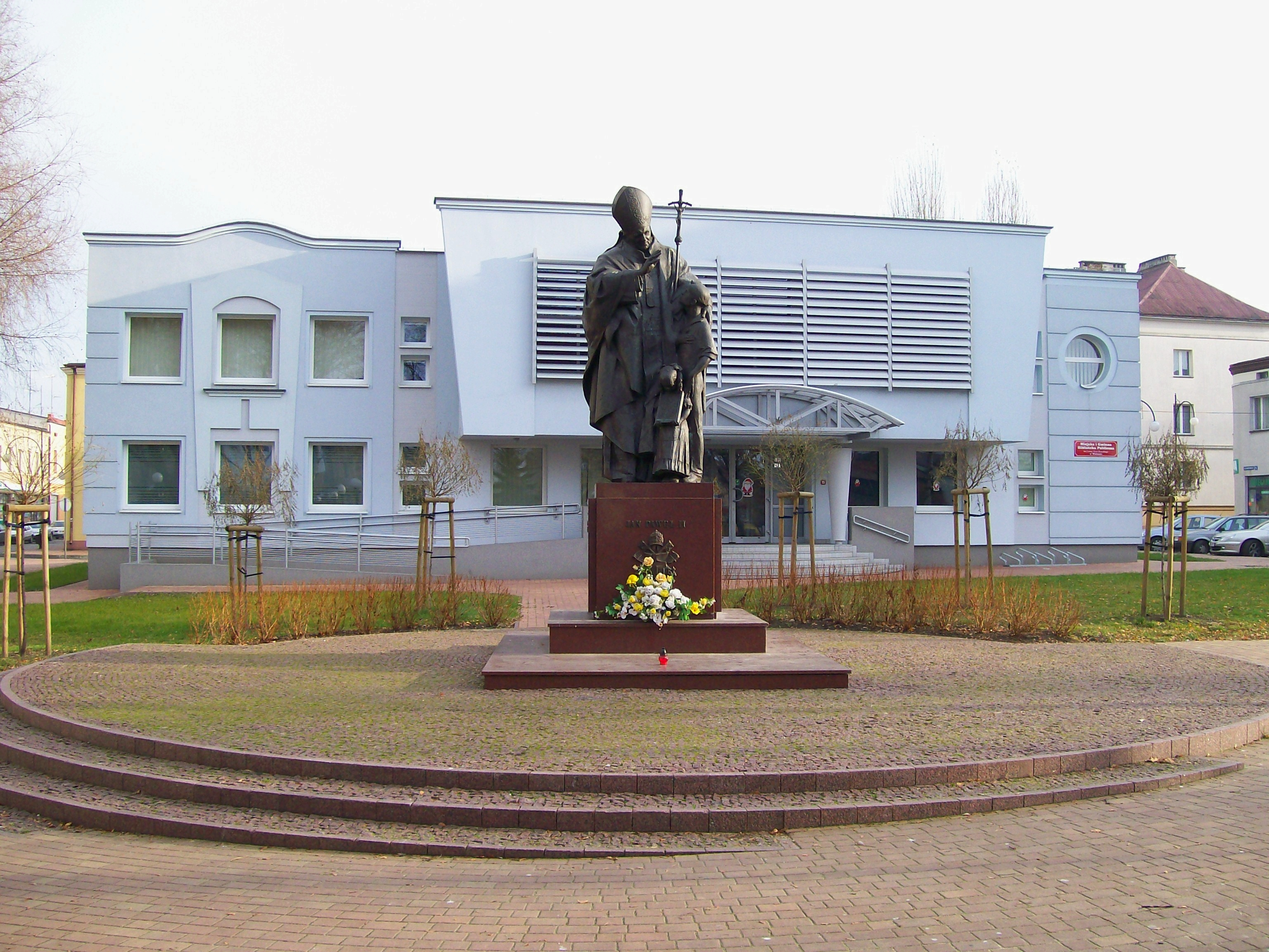 Pomnik Papieża Jana Pawła II, w tle Biblioteka Miejska im. Leona Kruczkowskiego